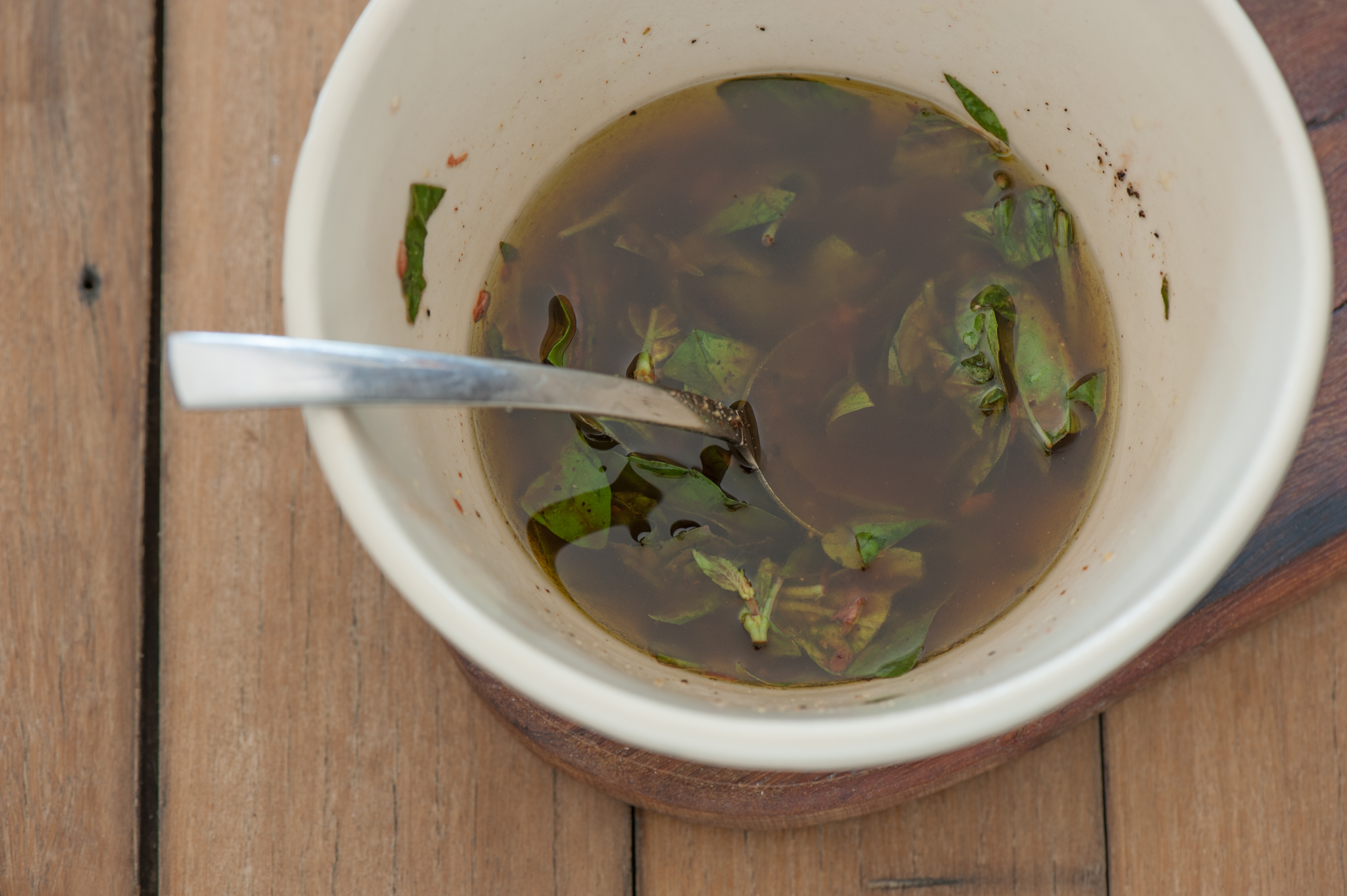 Sauce vigrainette